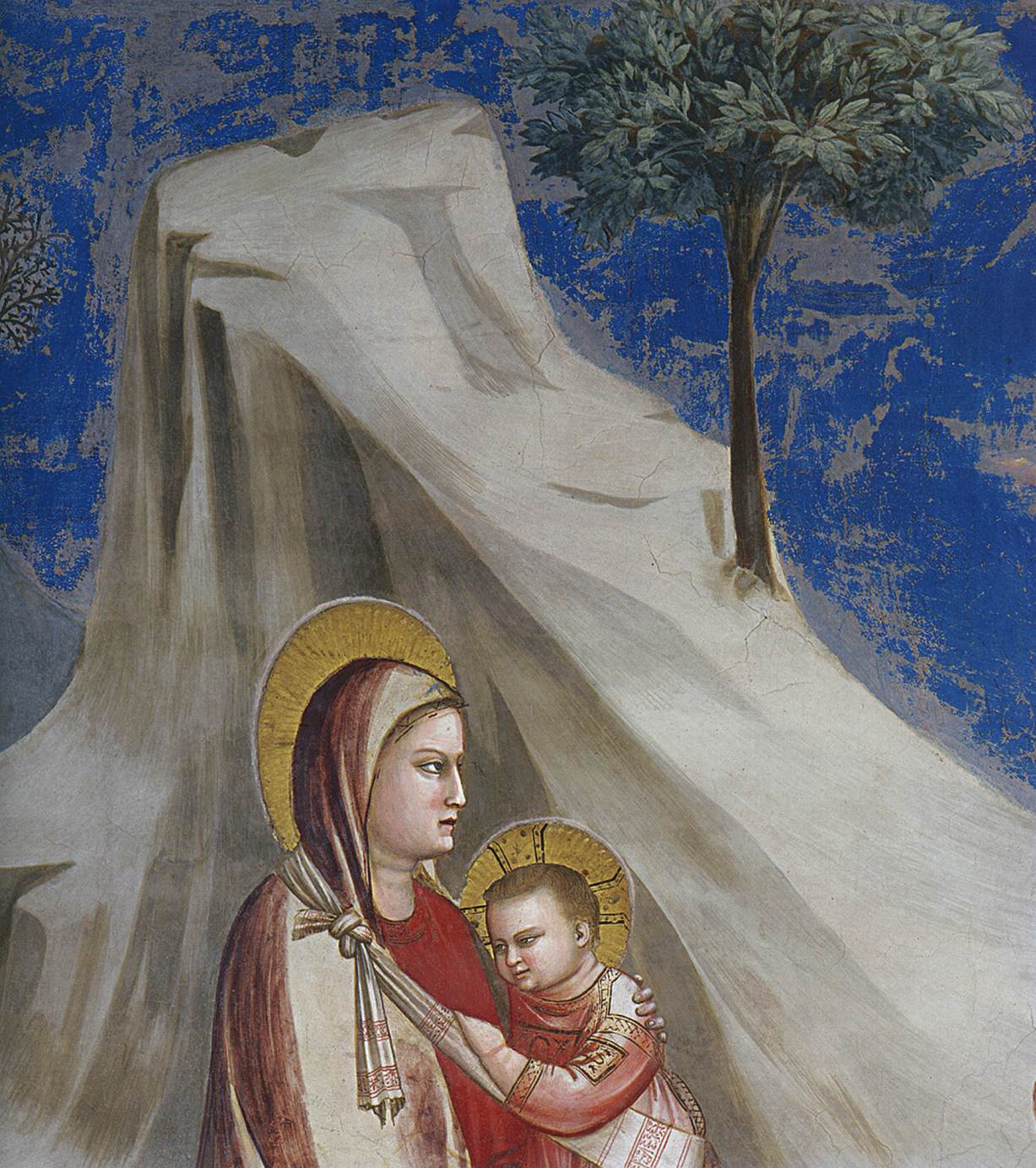 Джота. Уцёкі ў Егіпет. Мадонна з дзіцем